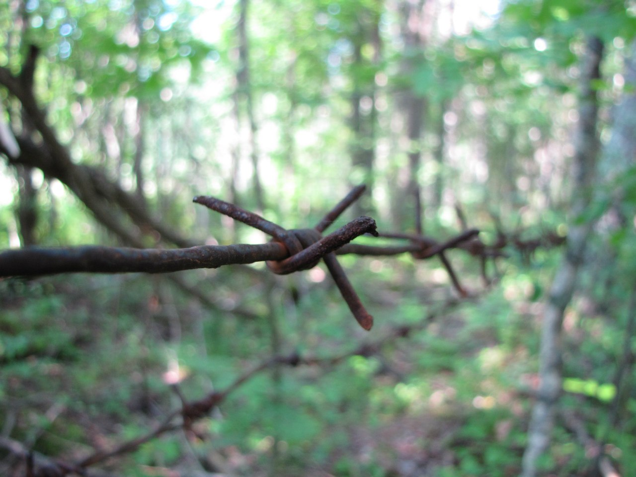 Колючая проволока ржавая